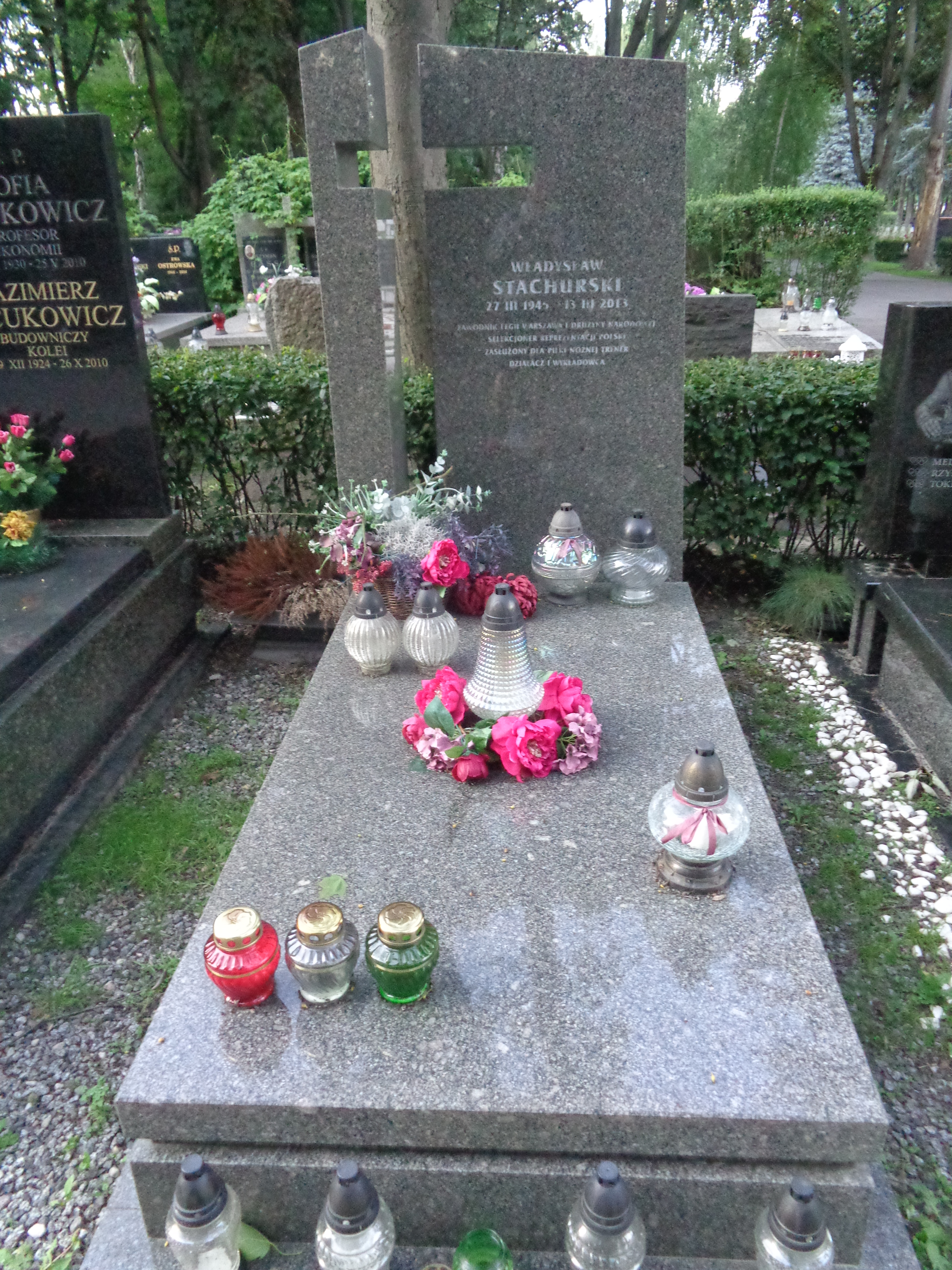 Grób piłkarza i trenera Władysława Stachurskiego na Cmentarzu Wojskowym na Powązkach w Warszawie